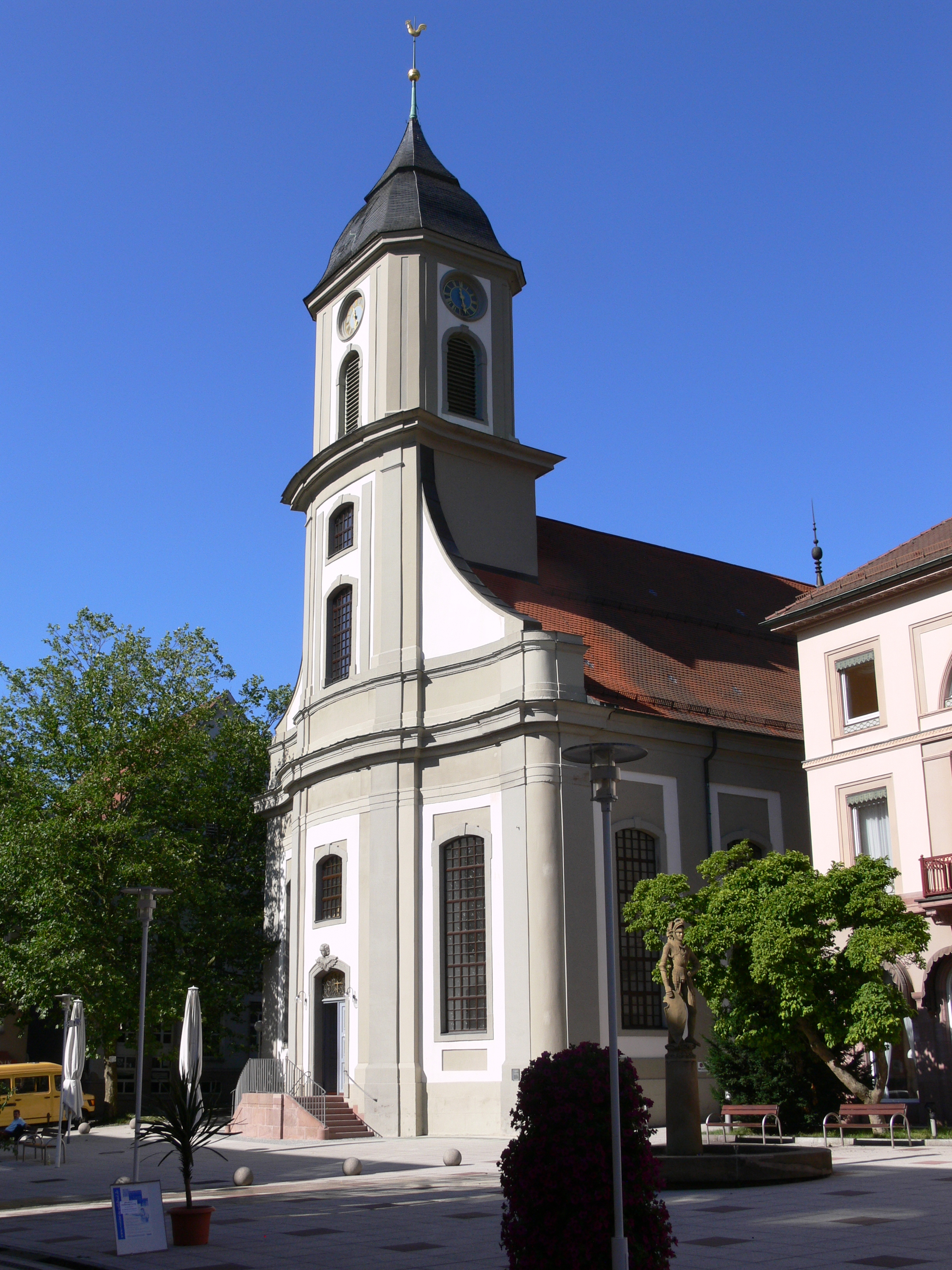 Evangelische Stadtkirche, Kurplatz, Bad Wildbad